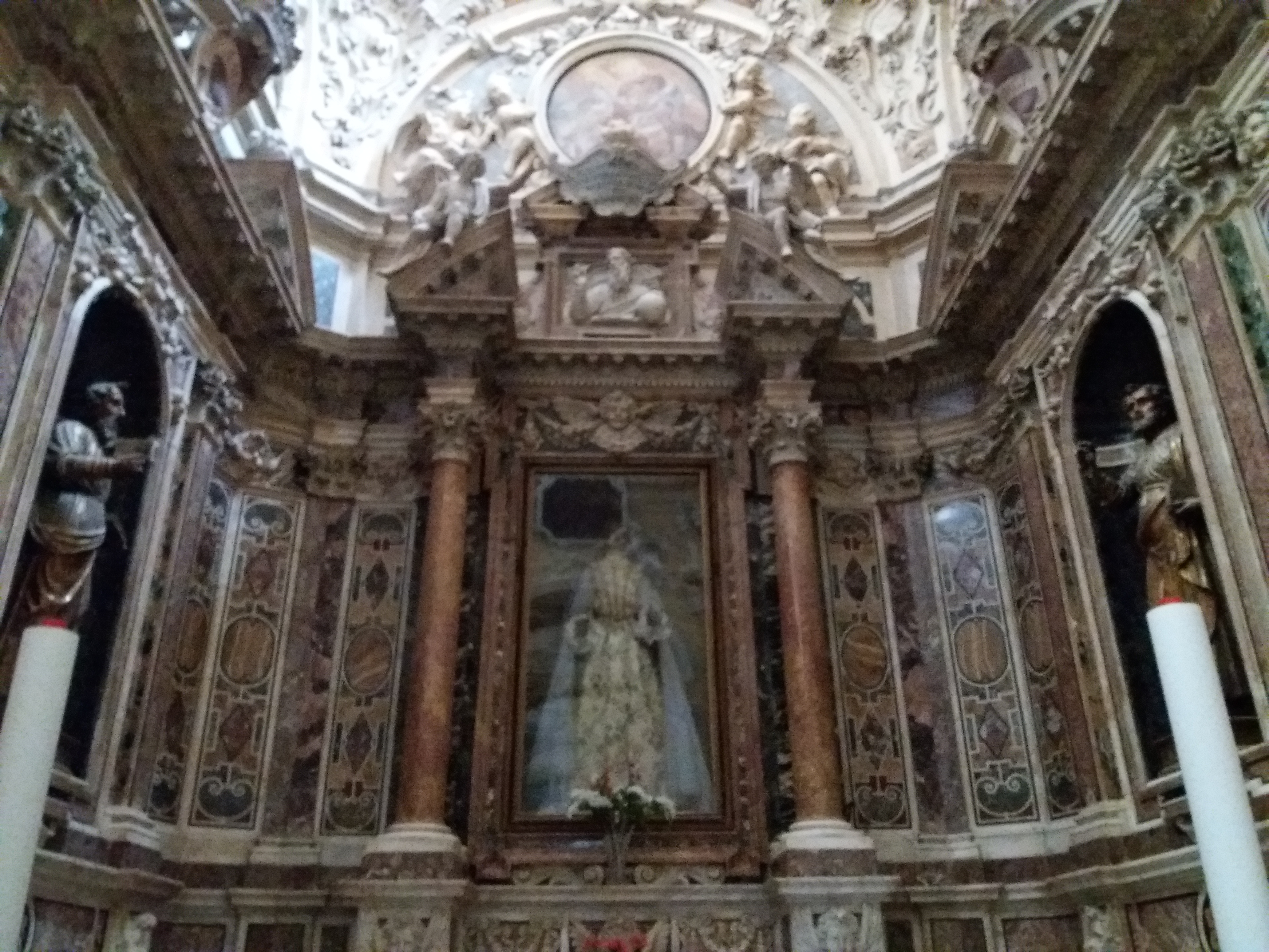 Sulmona: Chiesa della Santissima Annunziata